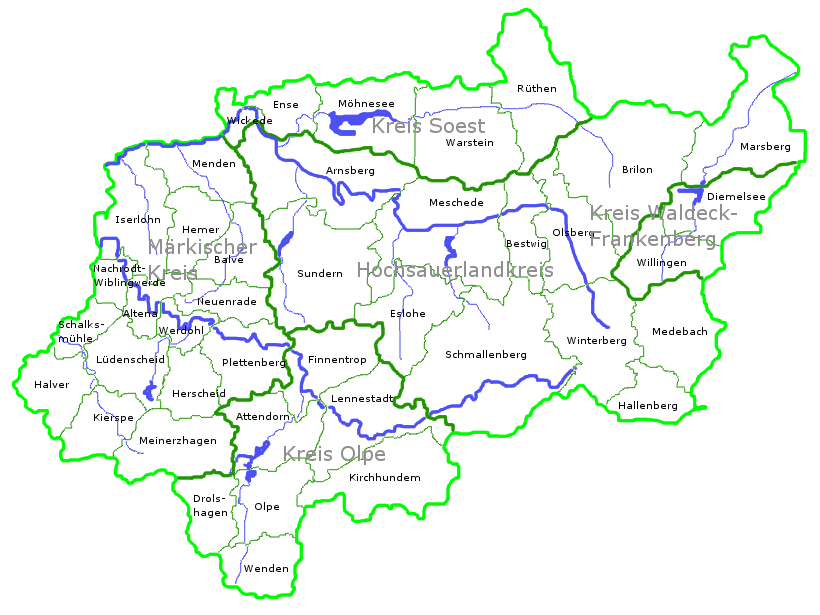 Karte des Sauerlands mit Kreisen, Städte/Gemeinden und wichtigen Flüssen